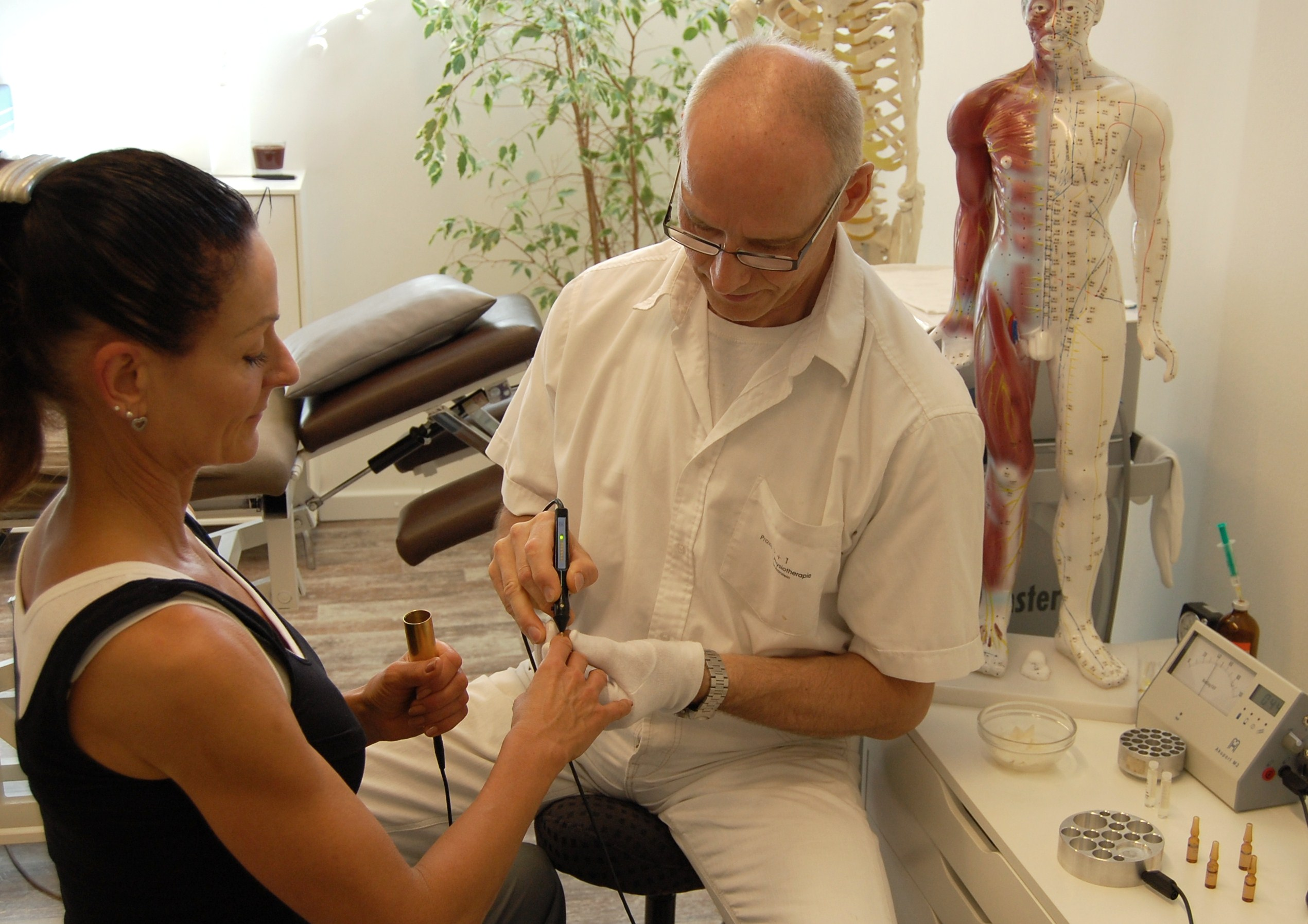 Anwendung der Elektro-Akupunktur nach Dr. Voll